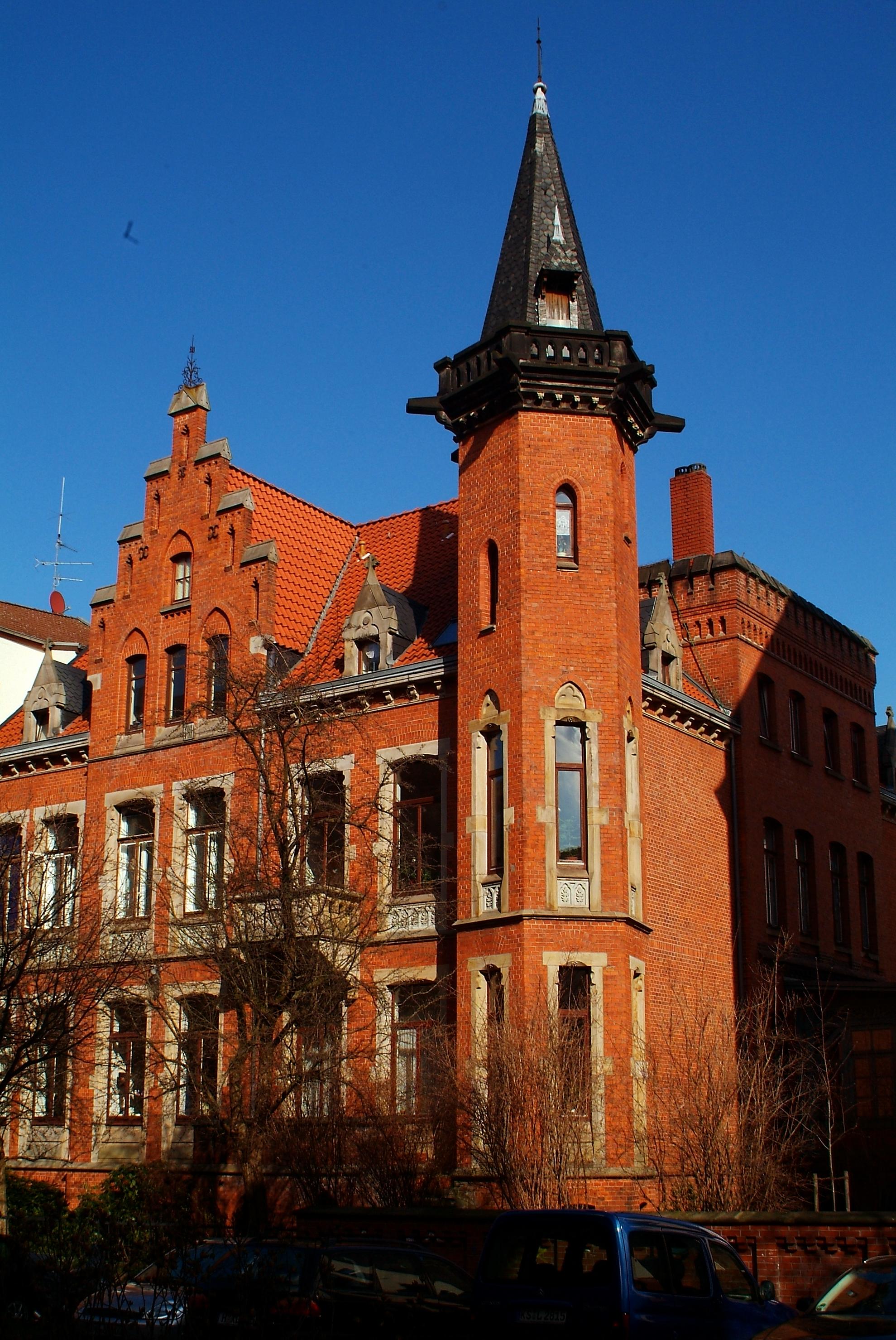 Die von dem Hase-Schüler und Architekten Wilhelm Orgelmann (1849–1898) für sich selbst im neugotischen Stil errichtete Villa Im Moore 24 in der Nordstadt von Hannover ...